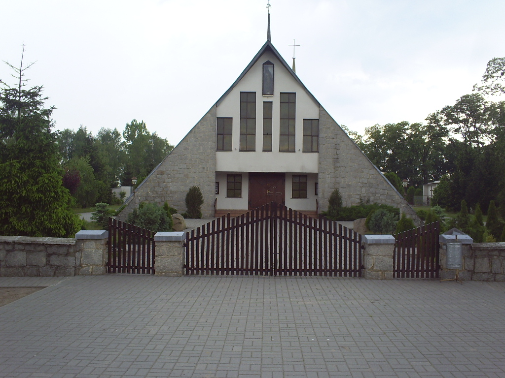 Kościół w Chrośnicy